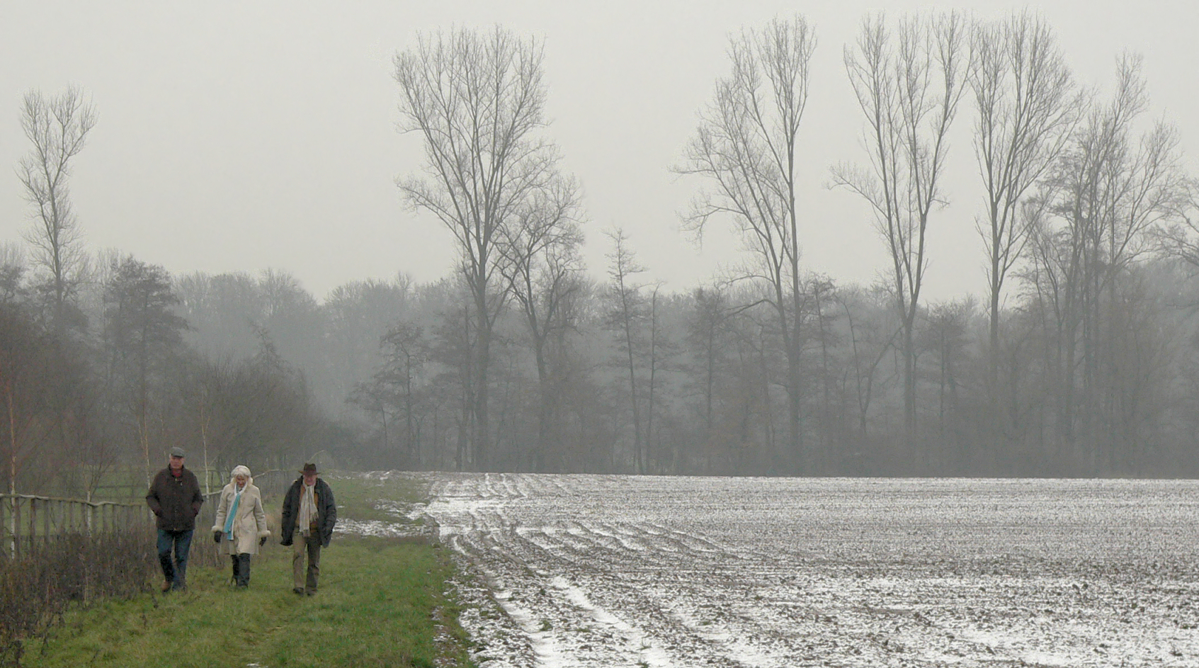 Initiatoren der Petition "Erhalt des Römerlagers Wilkenburg" aus der "Initiative Kultur bergen, statt Kies" am Gelände des Römischen Marschlagers Wilkenburg